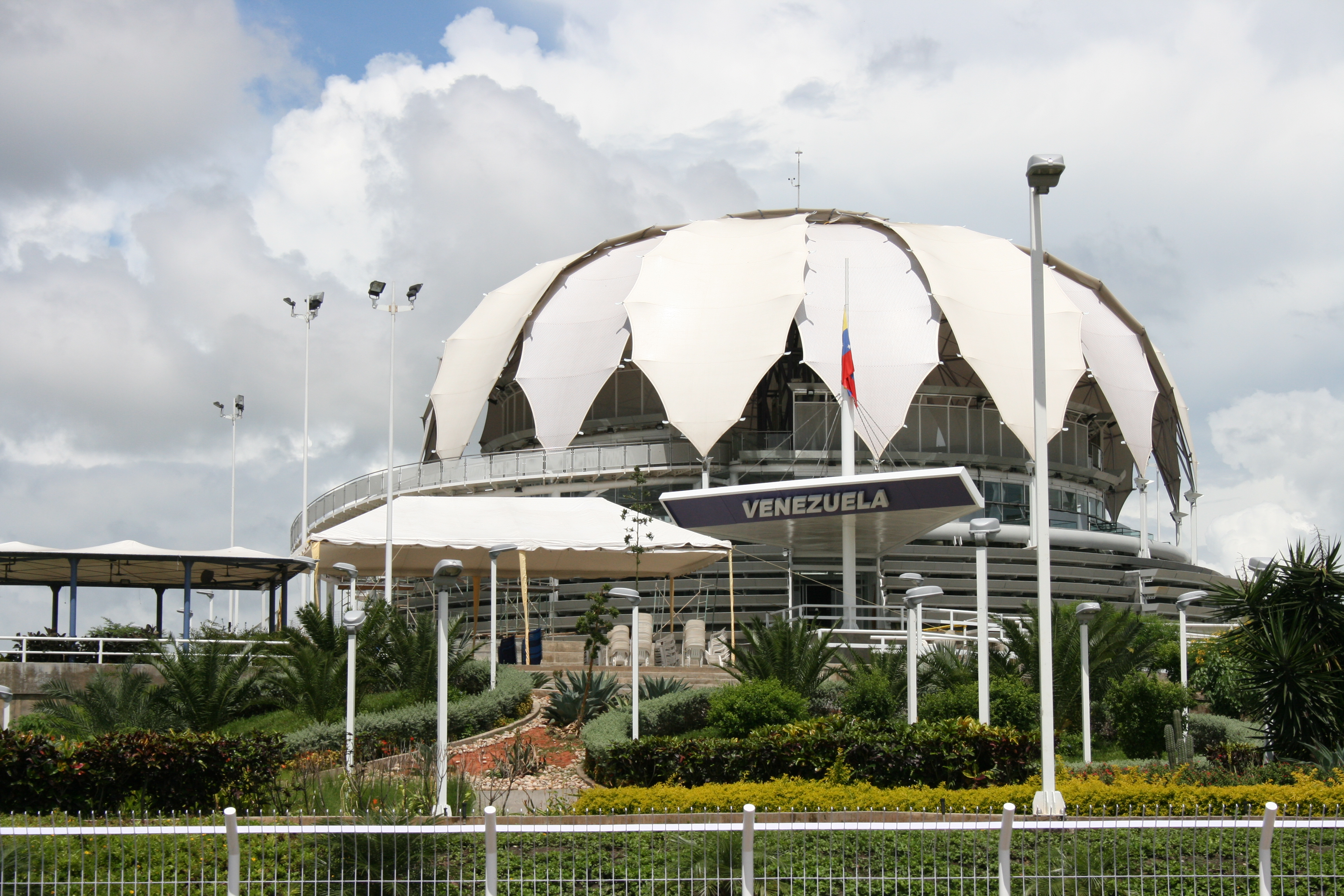 La Flor de Hannover, Barquisimeto, Edo Lara